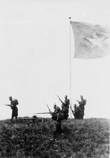 45 photos de types d'indigènes du Congo belge.